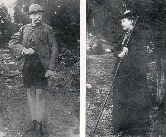 Adolf groothertog van Luxemburg & Adelheid prinses van Anhalt-Dessau